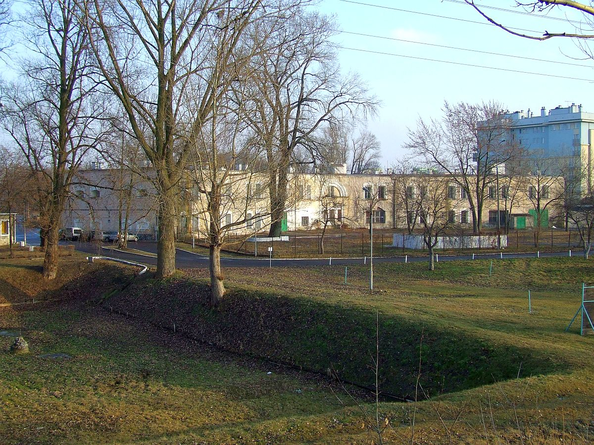 Fort Śliwickiego Cytadeli Warszawskiej, Warsaw